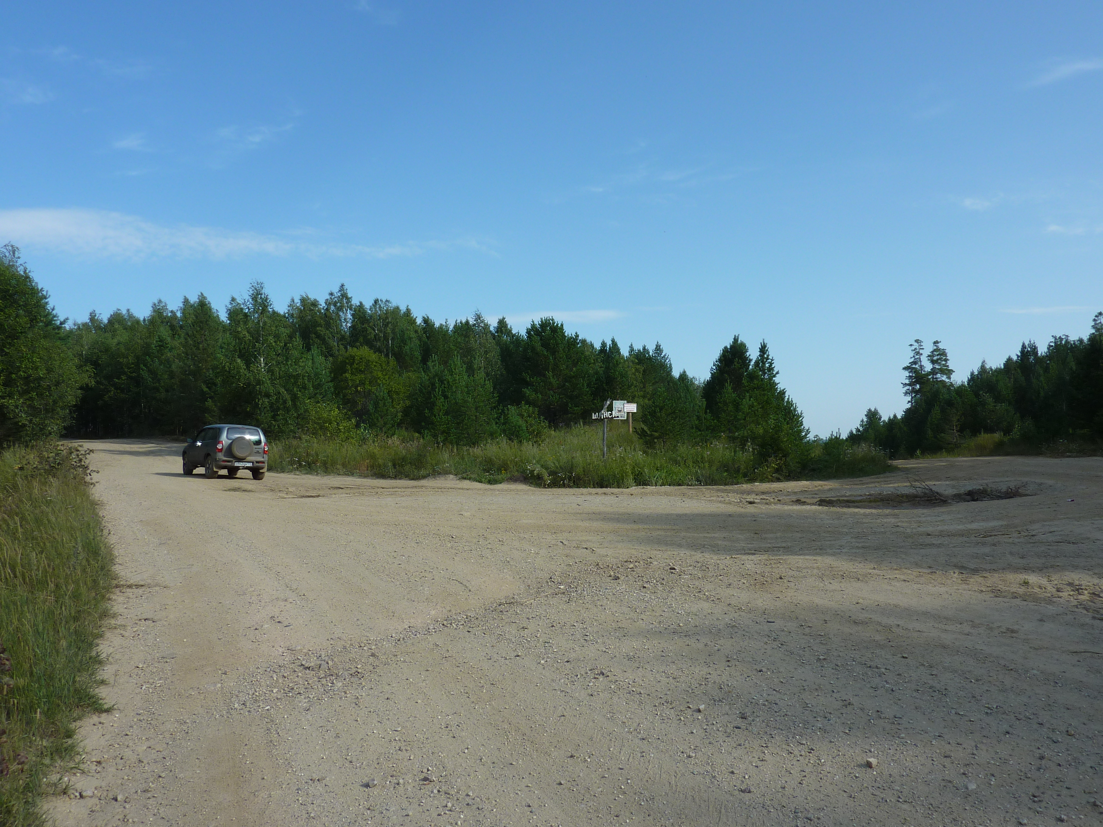 Сворот на Шанский